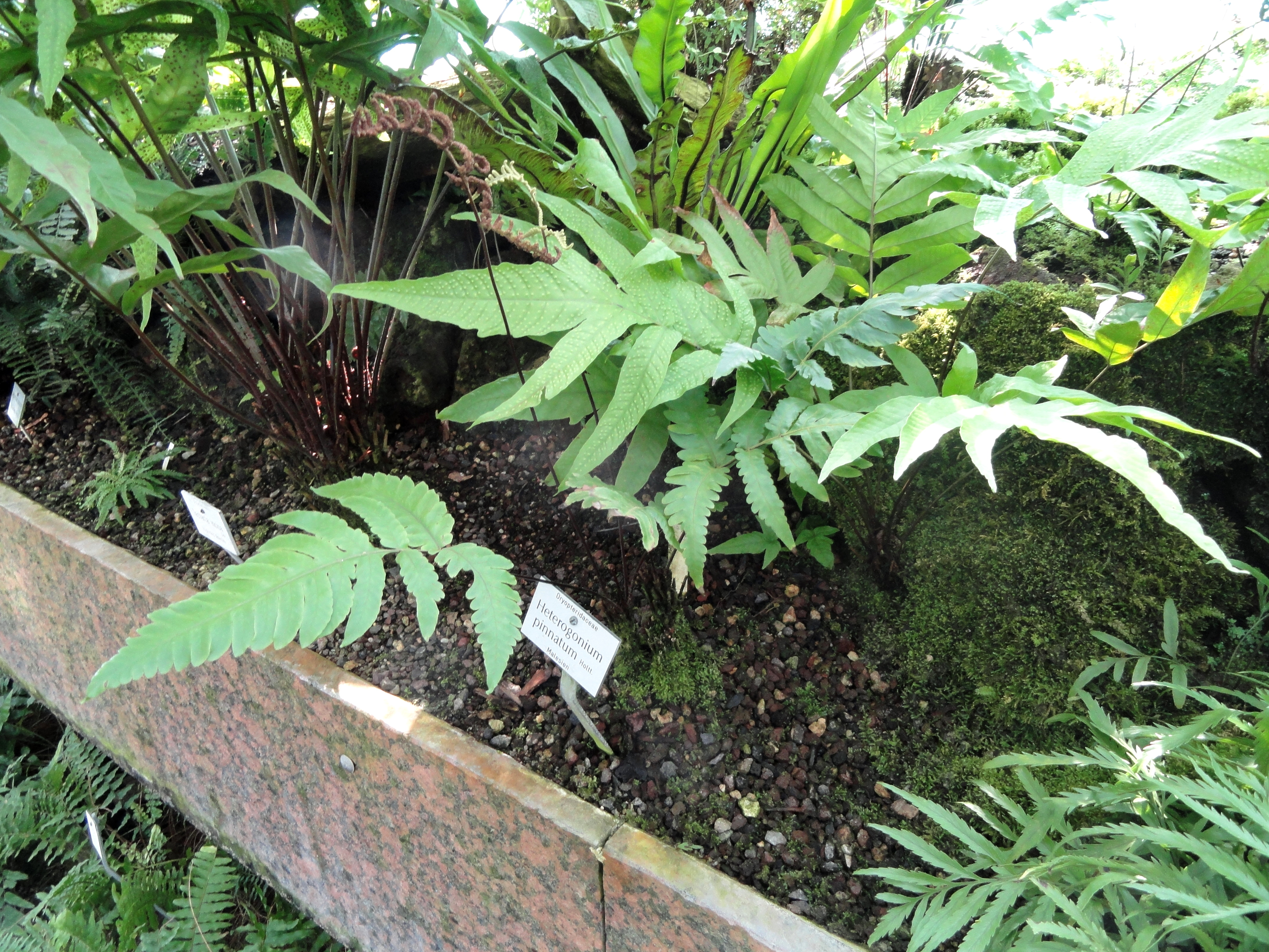 Heterogonium pinnatum specimen in the Botanischer Garten München-Nymphenburg, Munich, Germany.